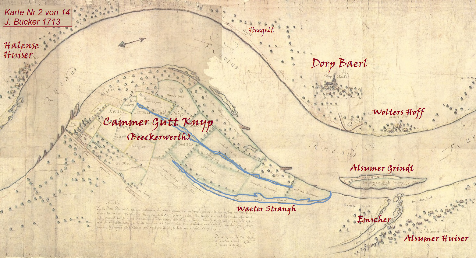 Bucker-Karte Nr. 2 von 14 - Rheinkarte anno 1713 bei Beeckerwerth